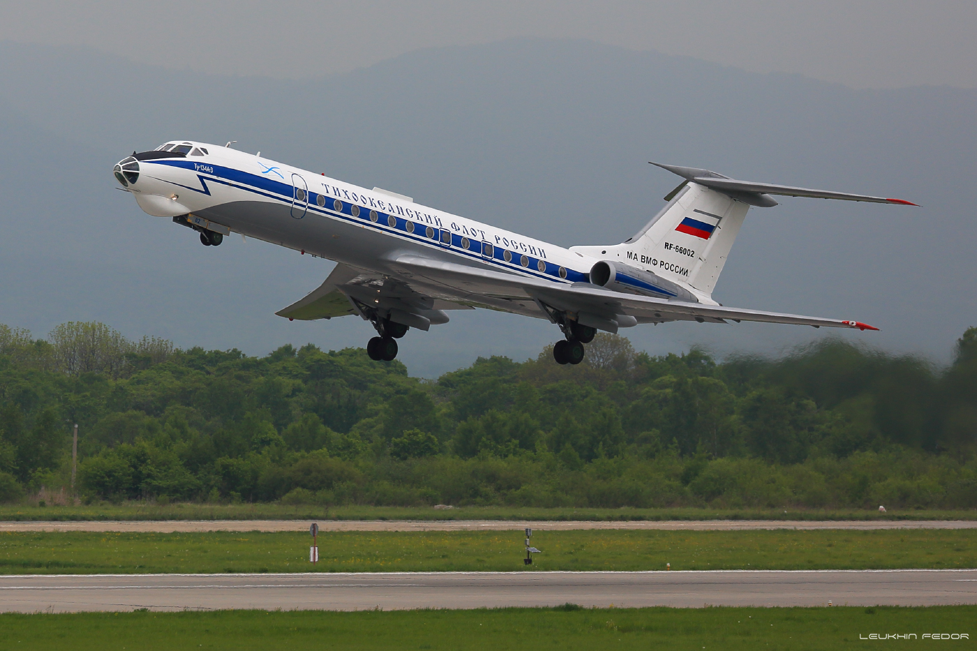 Russian Navy Tupolev Tu-134SH